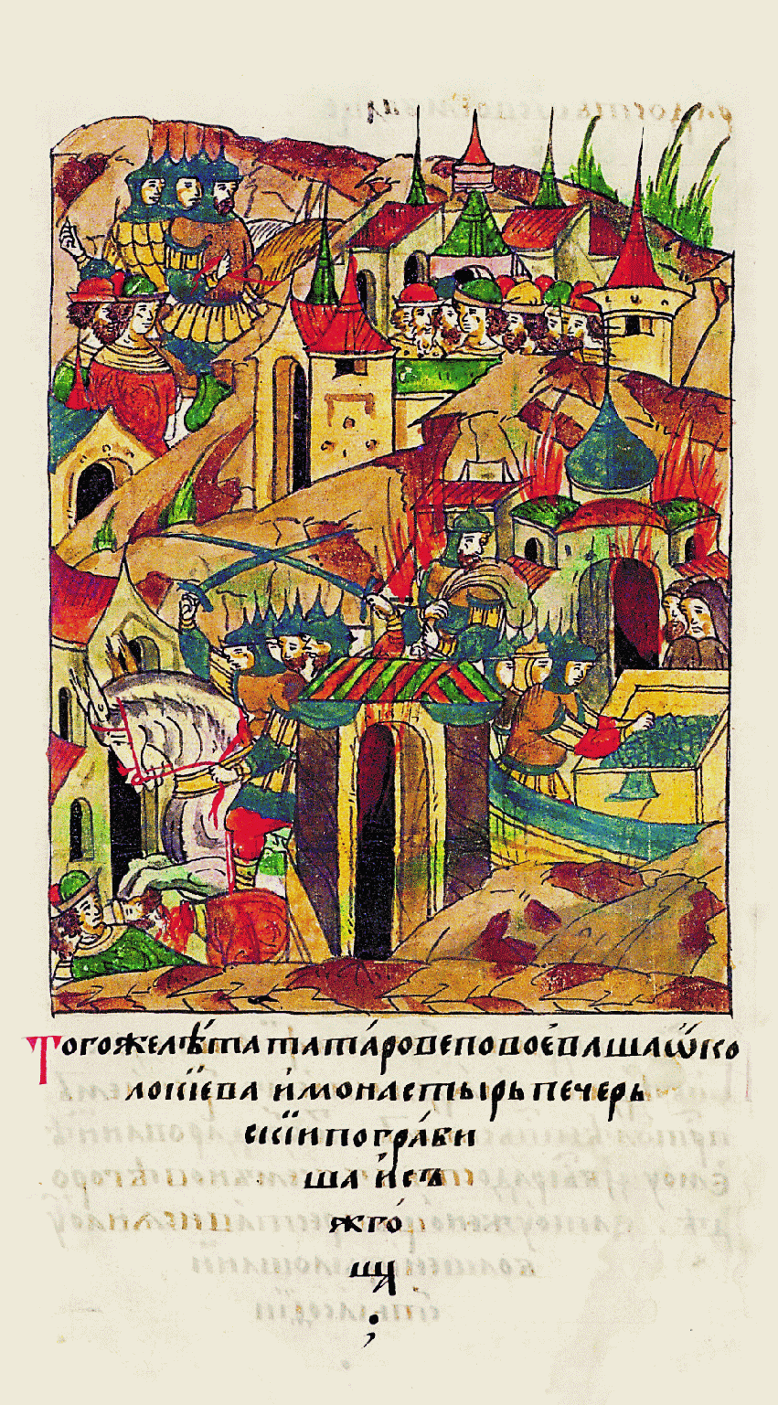 В том же году татары пришли к Киеву, разгра- били и сожгли Печер- ский монастырь.